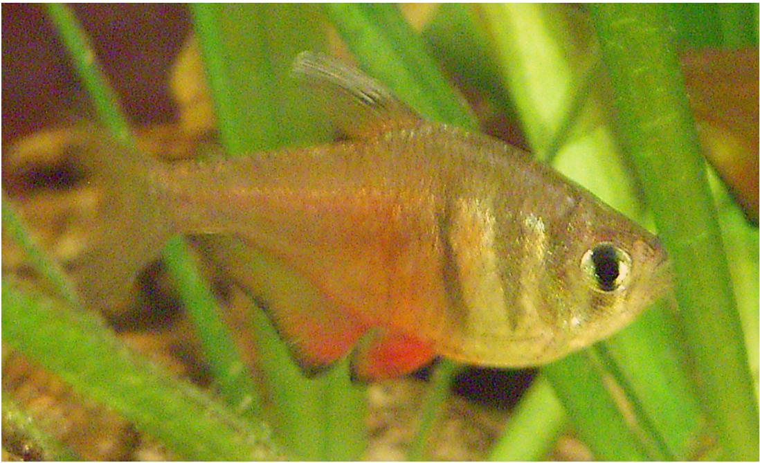 Hyphessobrycon flammeus (Flame Tetra)